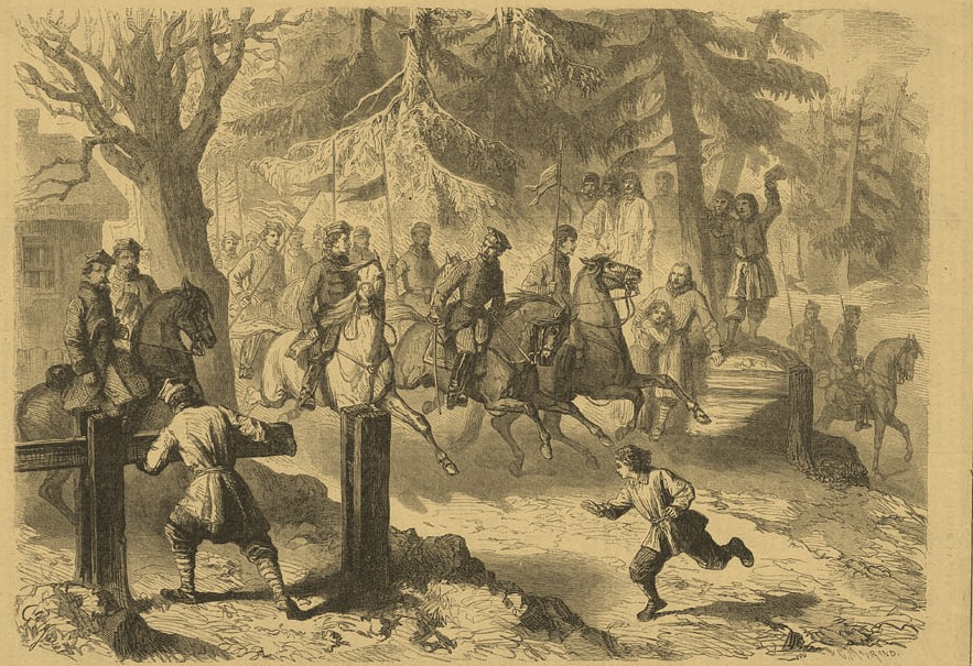 Oddział powstańczy witany przez chłopów na wiejskiej drodze Charles Maurand, 1864 drzeworyt, 223 x 305 mm